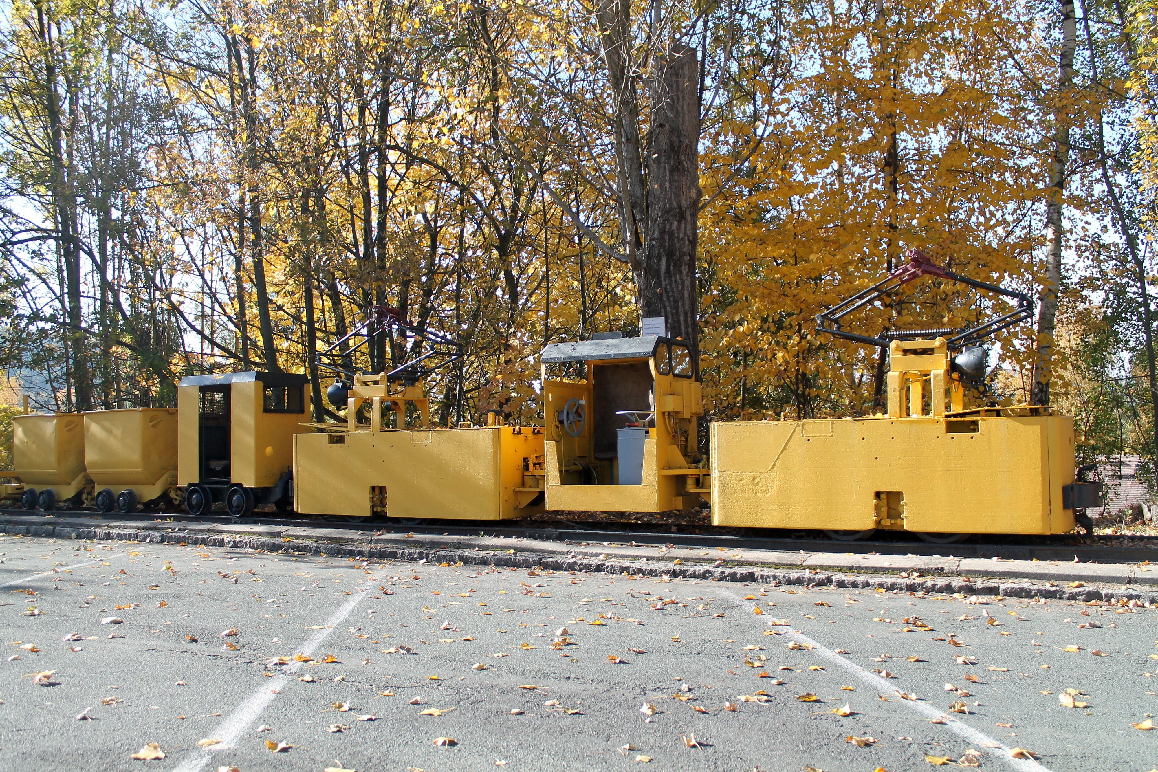 Tandem-Oberleitungslok EL 30T vor dem Kulturhaus Aktivist in Schlema.